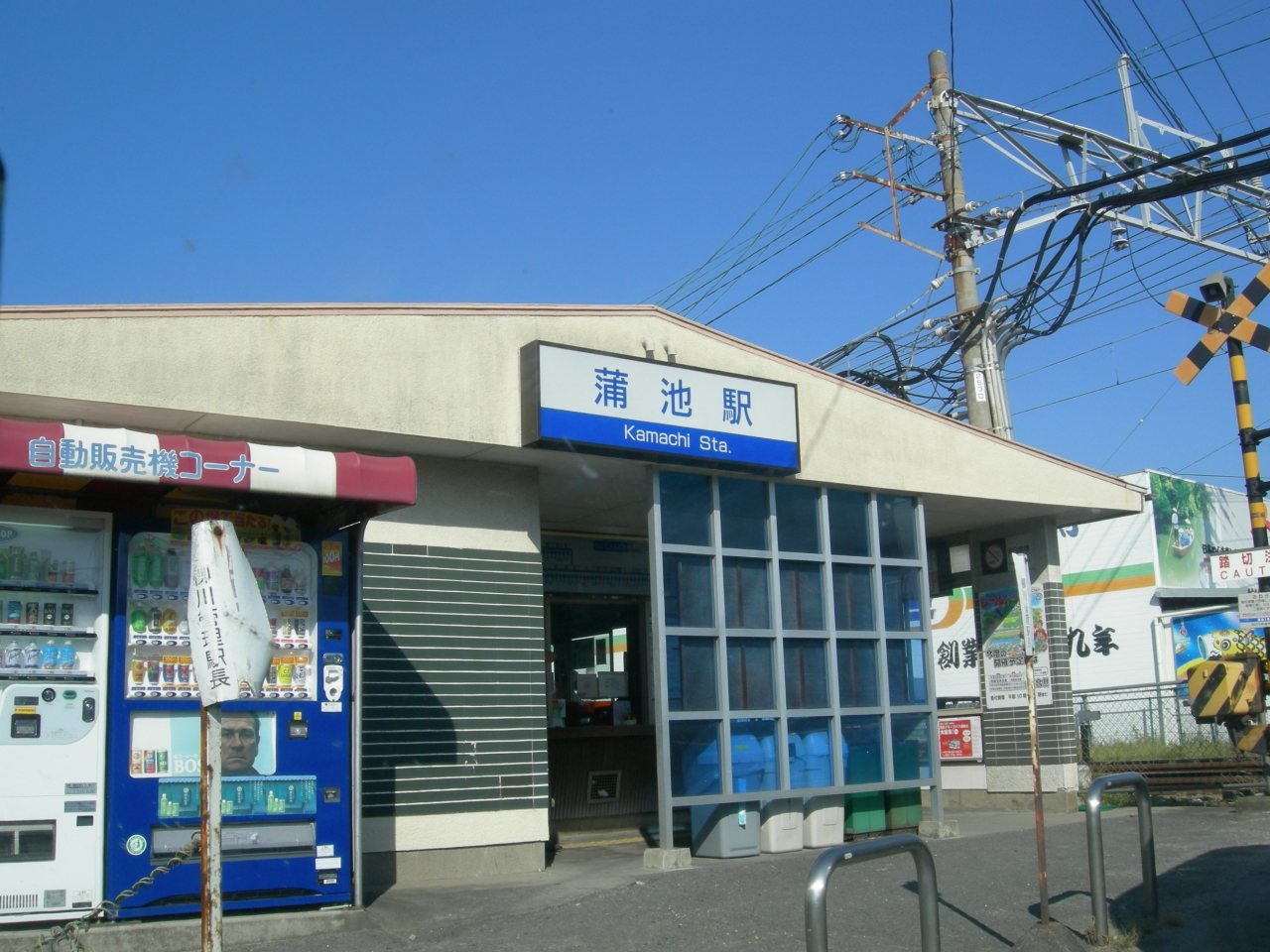 天神大牟田線・蒲池駅（2006年9月自身撮影）